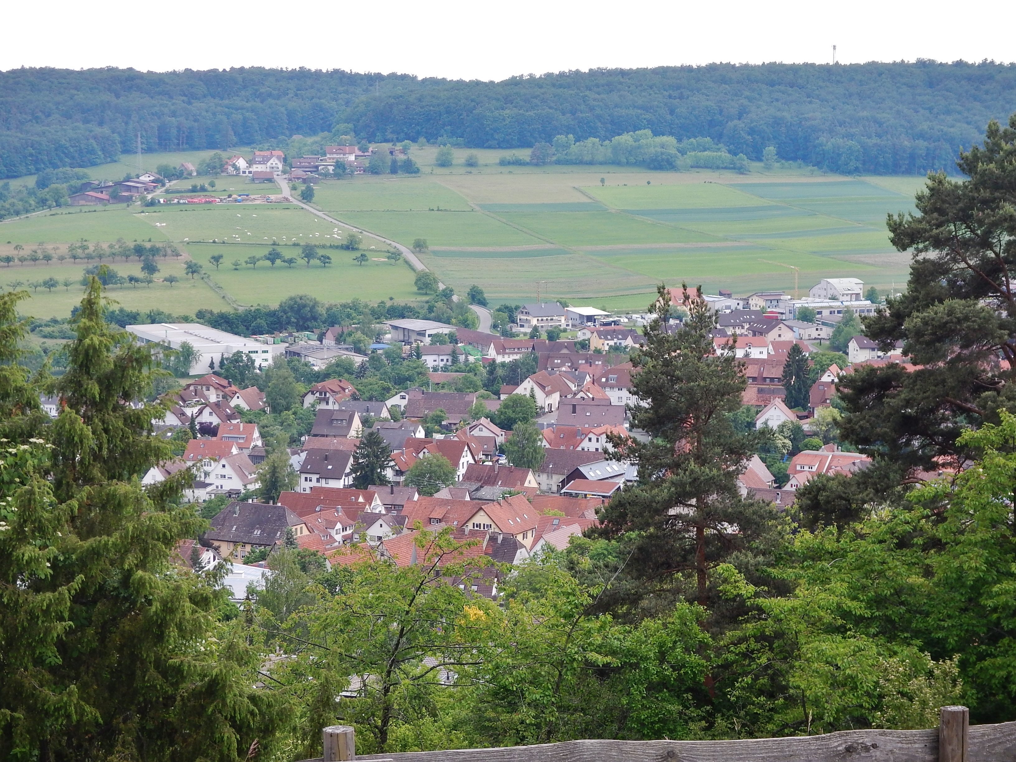 Ausblick vom Naturschutzgebiet Hörnle und Geißberg über Simmozheim zum Ortsteil Büchelbronn